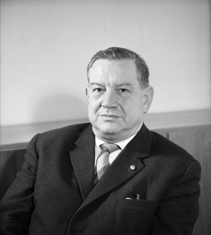 13.2.1963 Portrait des Bayrischen Ministerpräsidenten Alfons Goppel